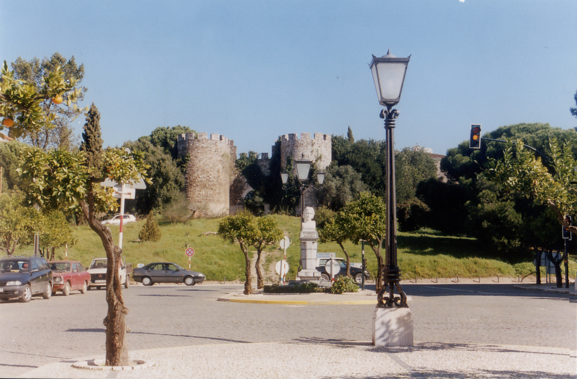 Castelo de Vila Viçosa, em Vila Viçosa, Portugal.